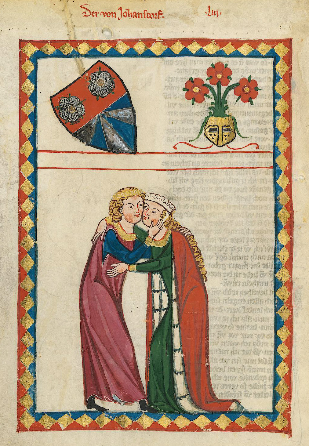 Codex Manesse, UB Heidelberg, Cod. Pal. germ. 848, fol. 179v, Der von Johansdorf